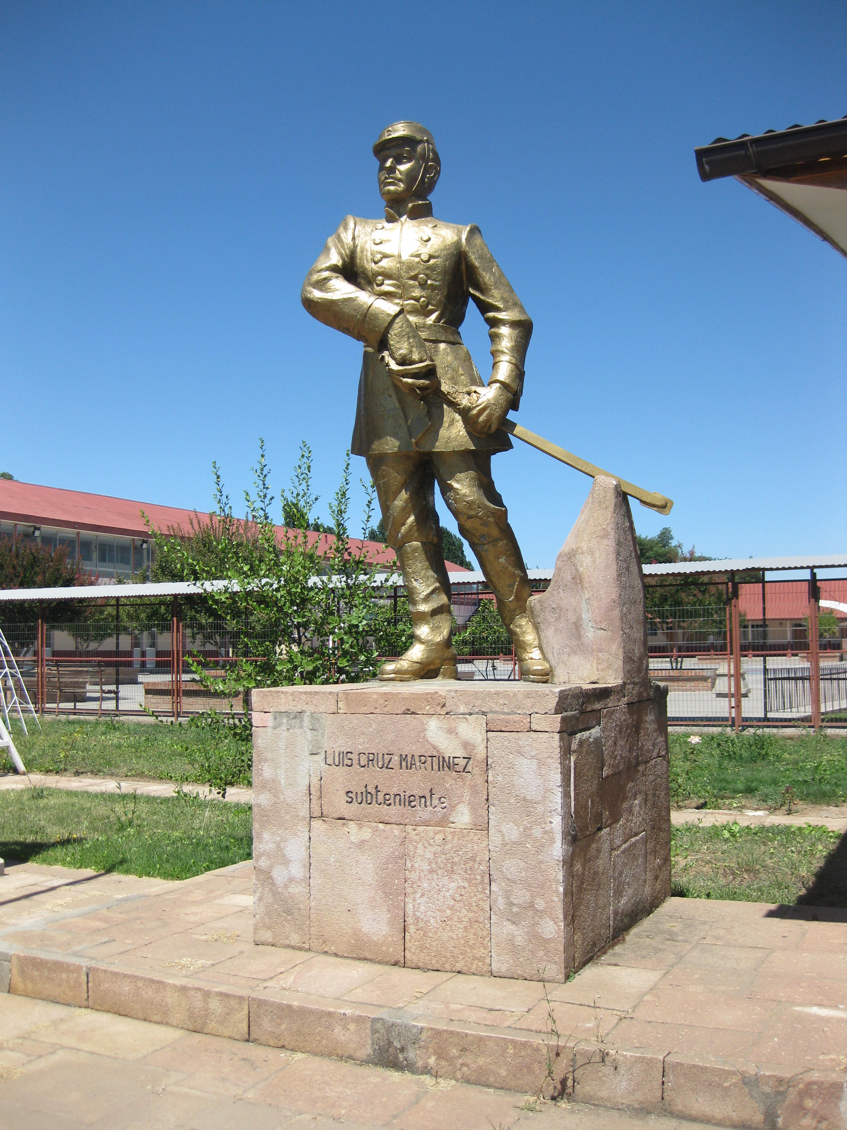 Estatua en honor al héroe Luis Cruz Martínez ubicada en su ciudad natal Molina.